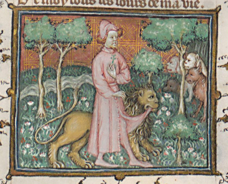 Iluminura Guillaume de Machaut guidé par le lion de Le Dit du Lyon nas obras completas de Guillaume de Machaut